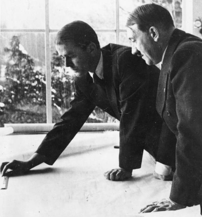 Zentralbild 5050-50 Architekt Speer war noch vor der Machtergreifung Hitlers der persönliche Freund des Bauzeichners Hitler; nicht nur die Gemeinsamkeit der beruflichen, sondern auch der politischen Interessen brachte sie näher. [1938?]